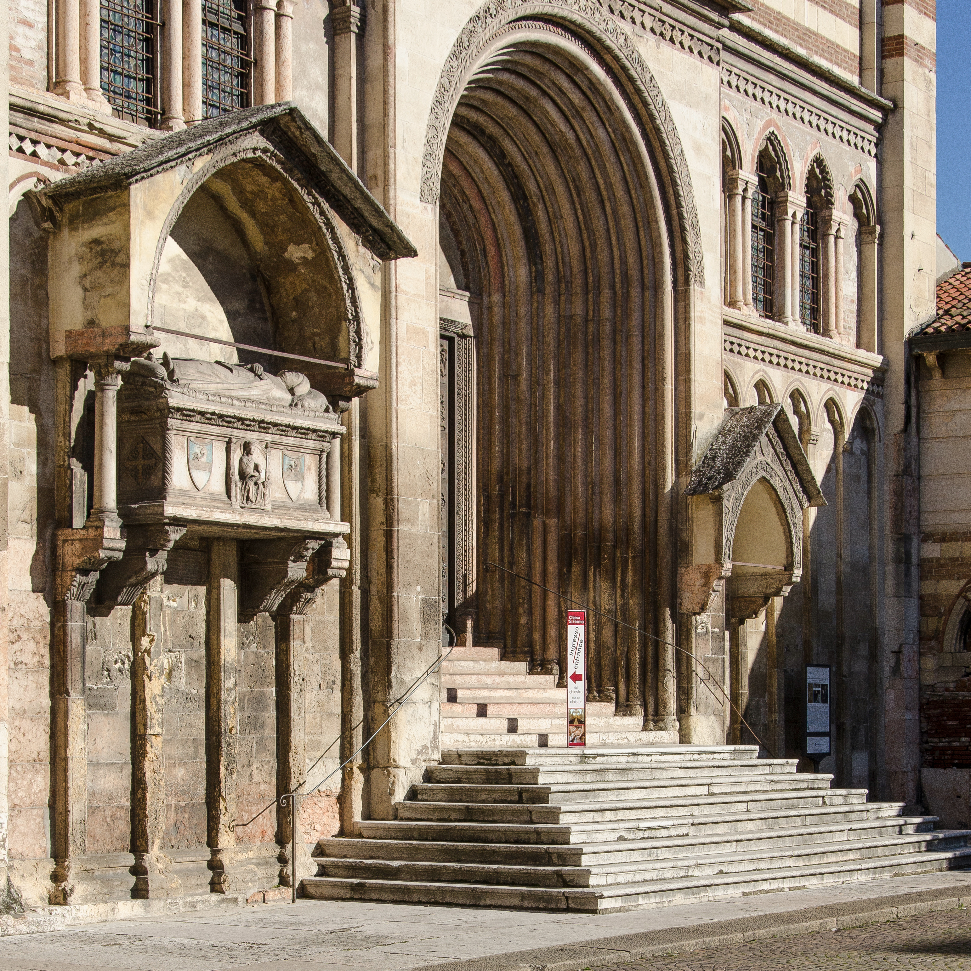 Fotografia dell'esterno